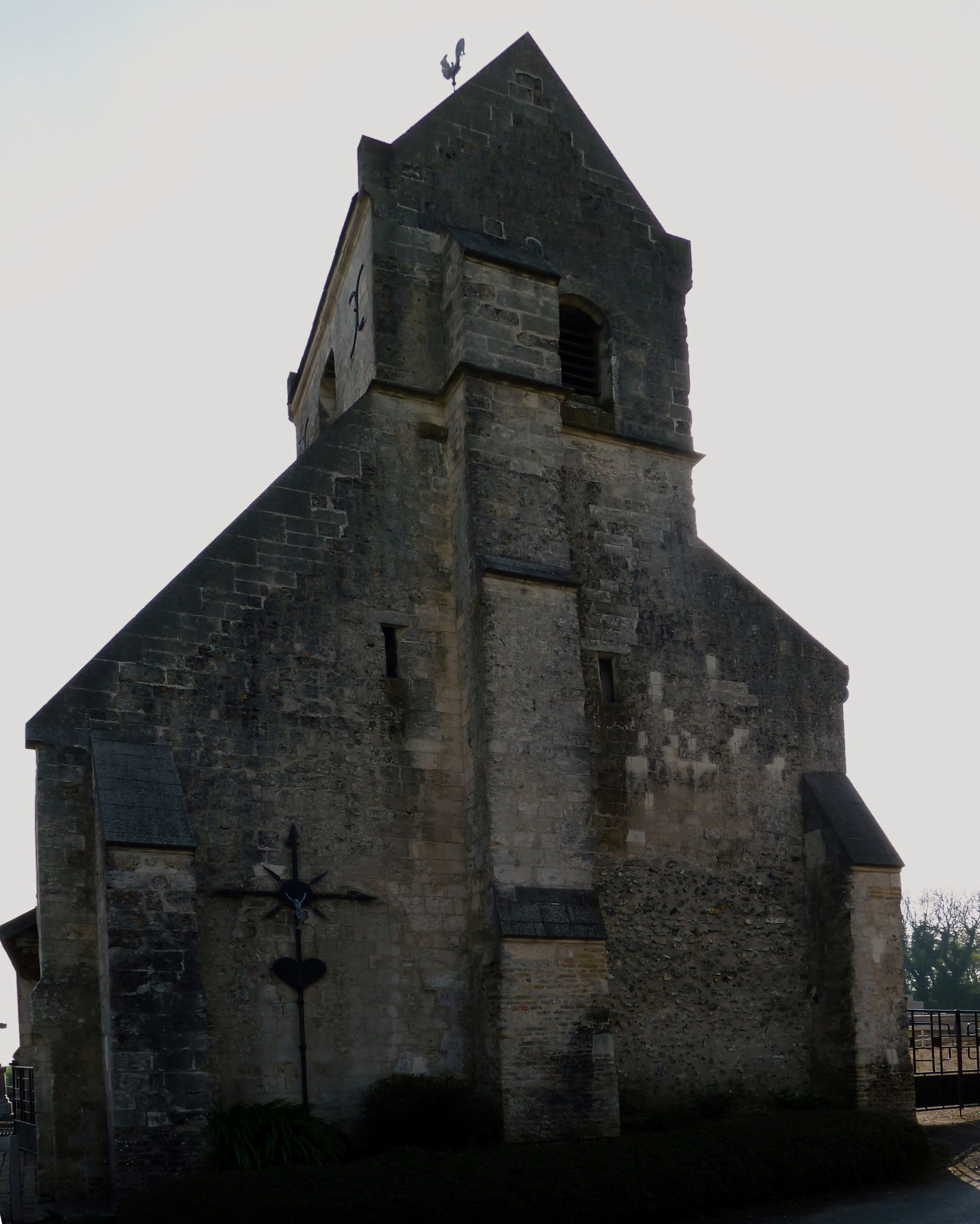 Église Saint-Maxime à Grand Difques à Difques .à Moringhem Pas-de-Calais.- France.